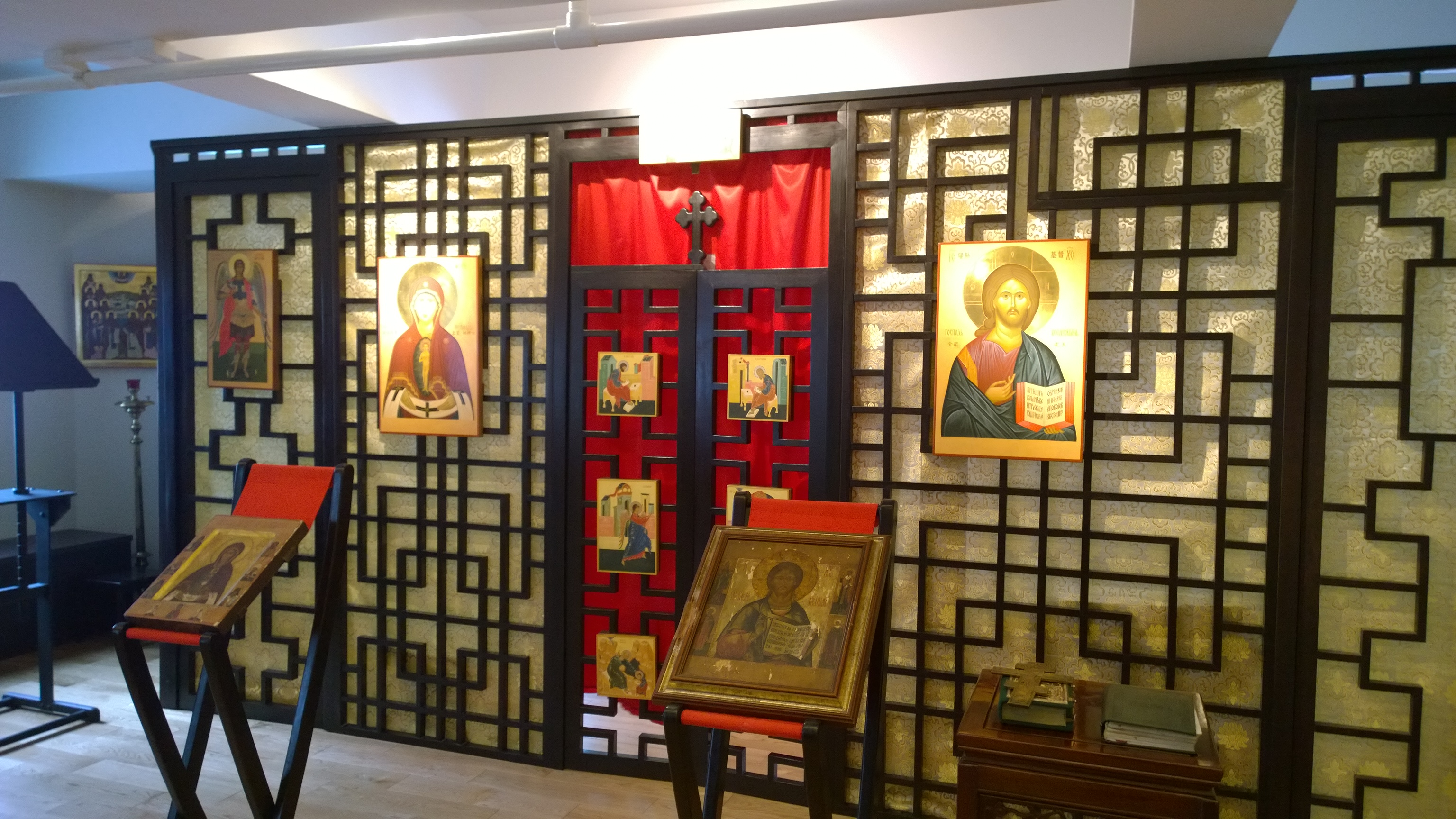 Церковь свв. Петра и Павла в Гонконге (иконостас)